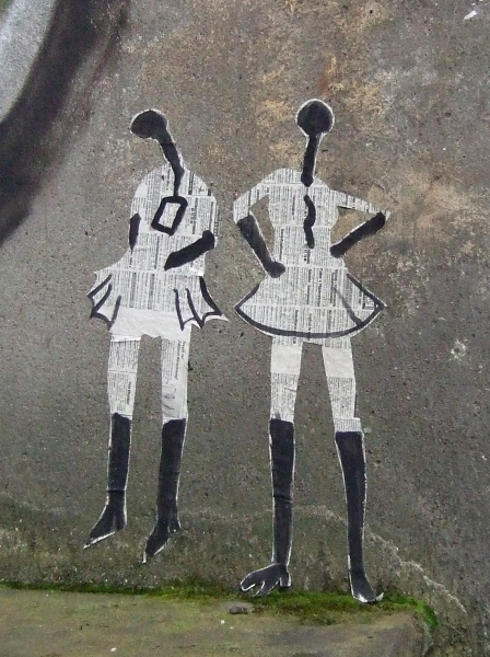 Streetart in Hamburg aus Zeitungspapier; Künstler: 2010